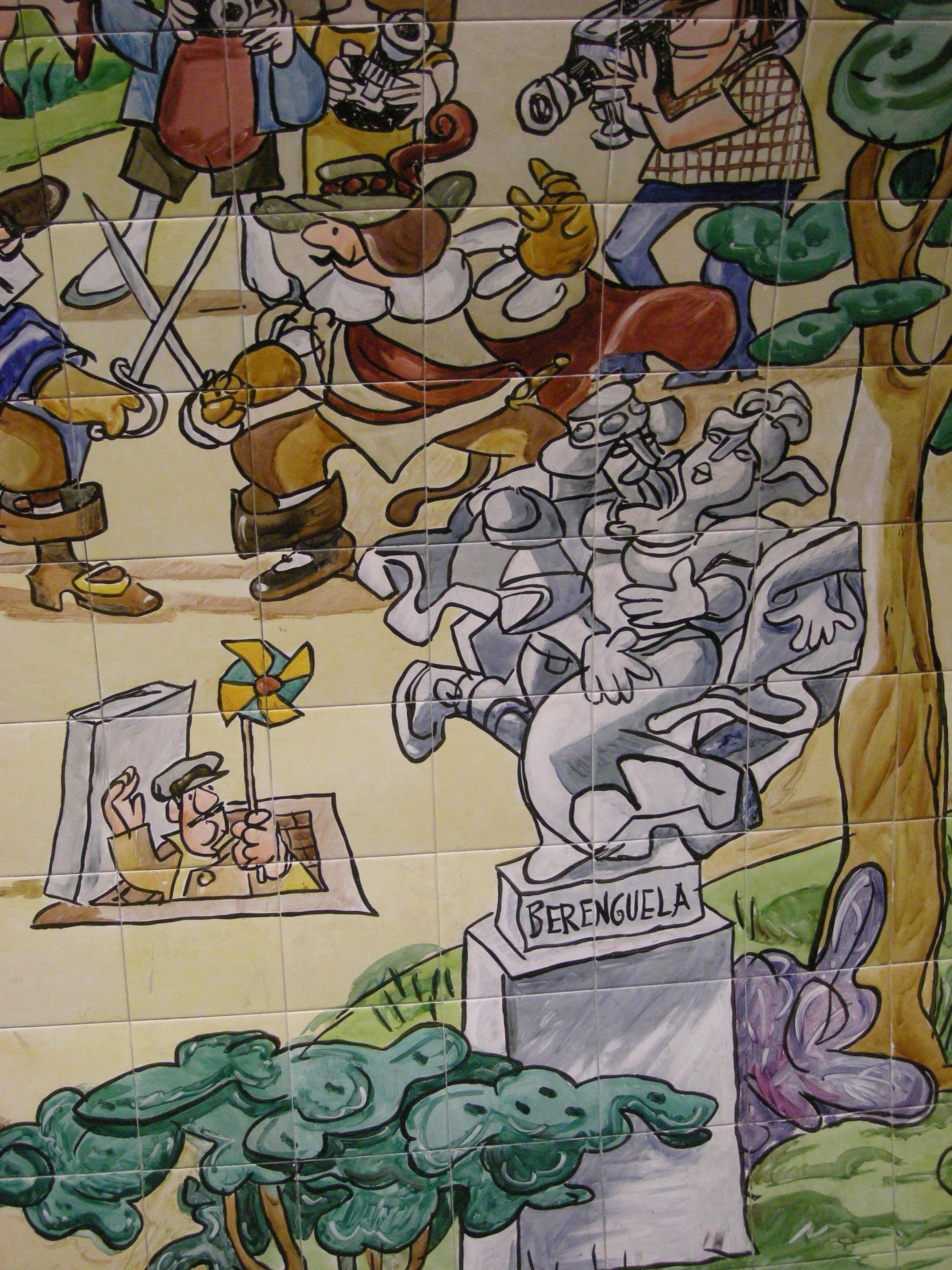 Mural de Antonio Mingote; Estación de Metro de Retiro, Madrid, España.